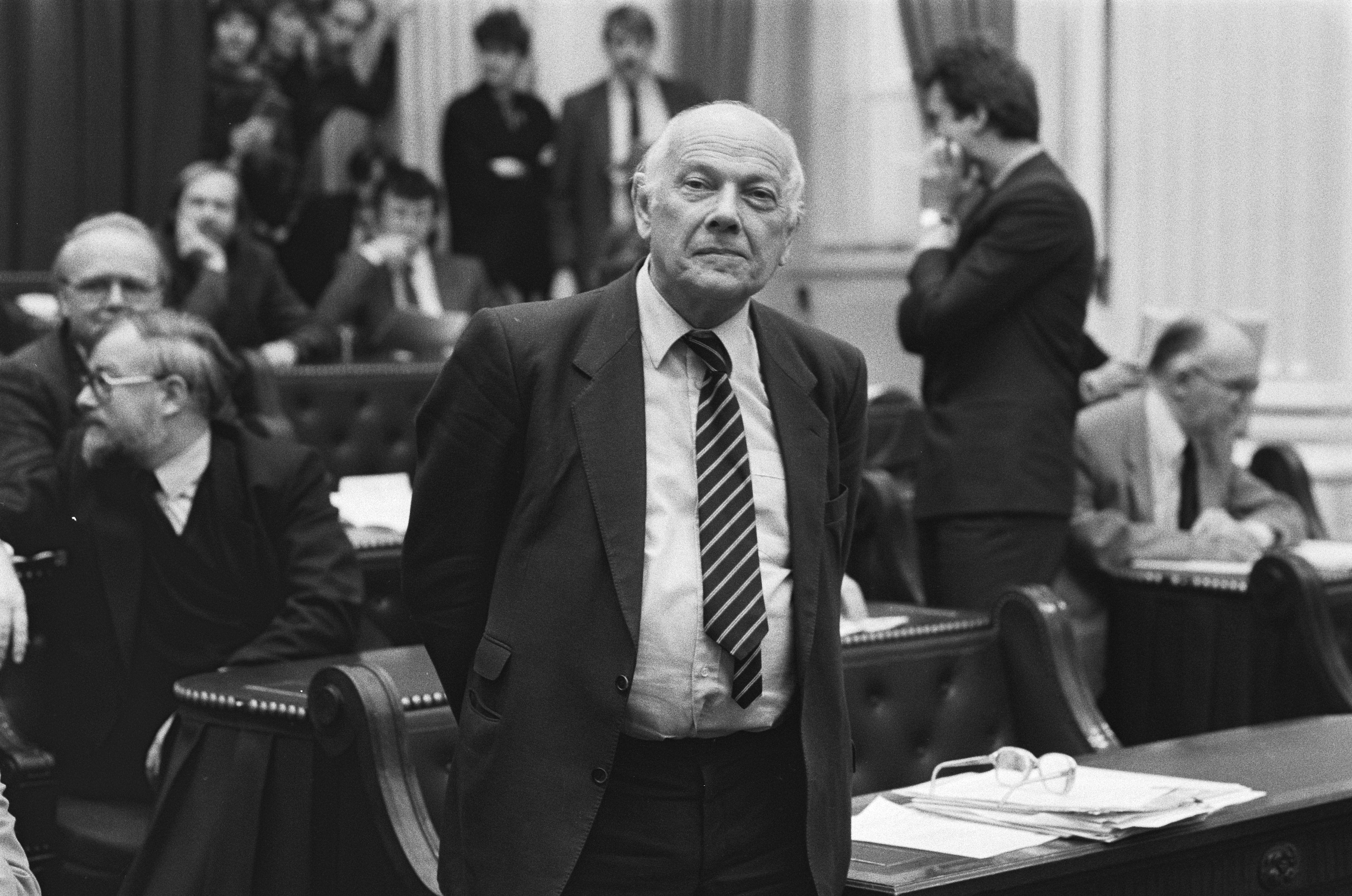 Collectie / Archief : Fotocollectie Anefo Reportage / Serie : [ onbekend ] Beschrijving : Joop den Uyl Datum : 28 januari 1986 Locatie : Den Haag, Zuid-Holland Trefwoorden : parlementariërs, politiek Persoonsnaam : Uyl, Joop den Fotograaf : [onbekend] Auteursrechthebbende : Nationaal Archief Materiaalsoort : Negatief (zwart/wit) Nummer archiefinventaris : bekijk toegang 2.24.01.05 Bestanddeelnummer : 933-5525